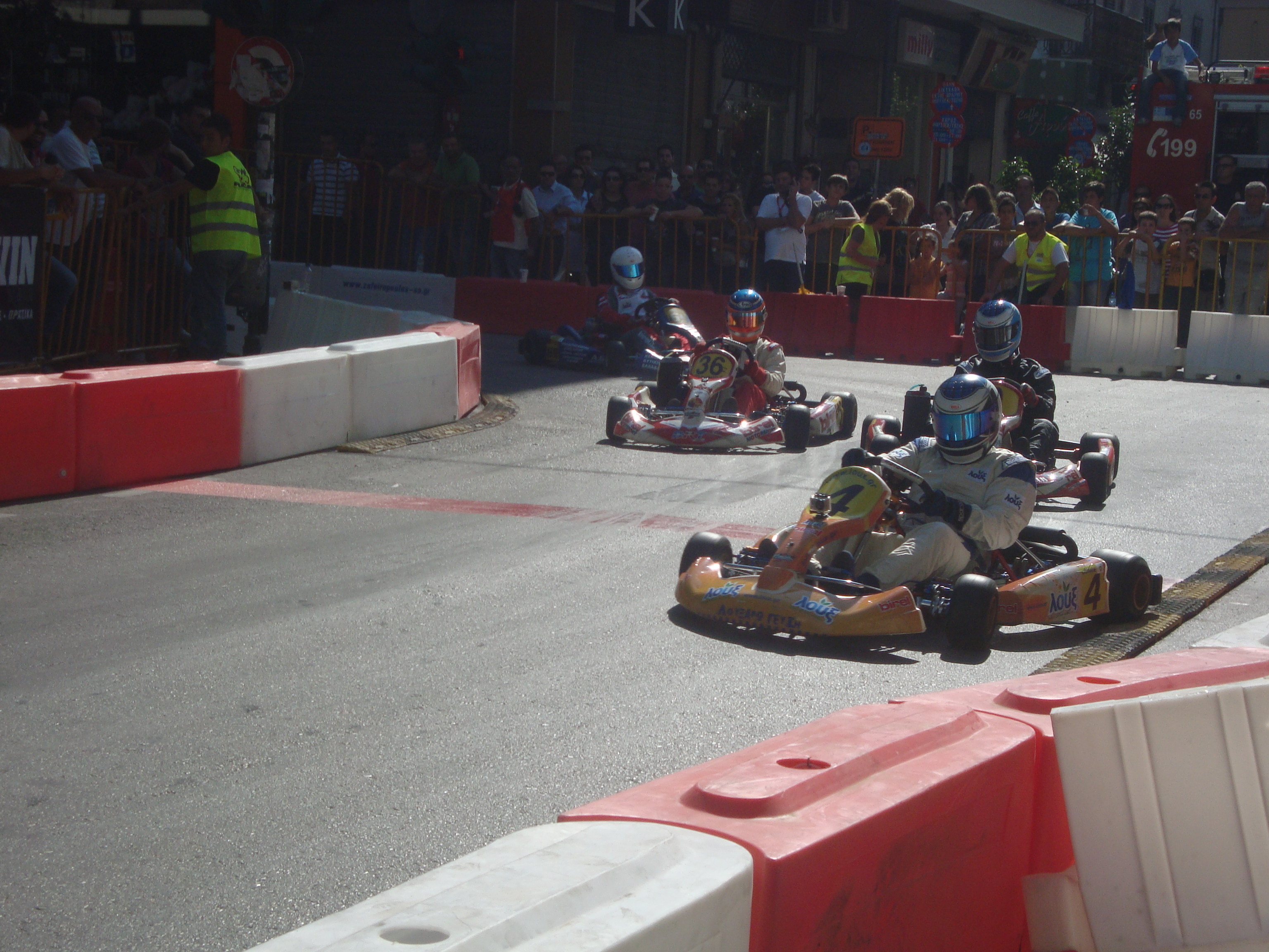 3οι διεθνείς αγώνες καρτ 2011, με το νούμερο 4 ο Πλάτων Μαλαφέκας, με το νούμερο 36 ο Αλέξανδρος Σουλάνης